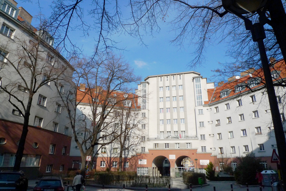 Reismannhof